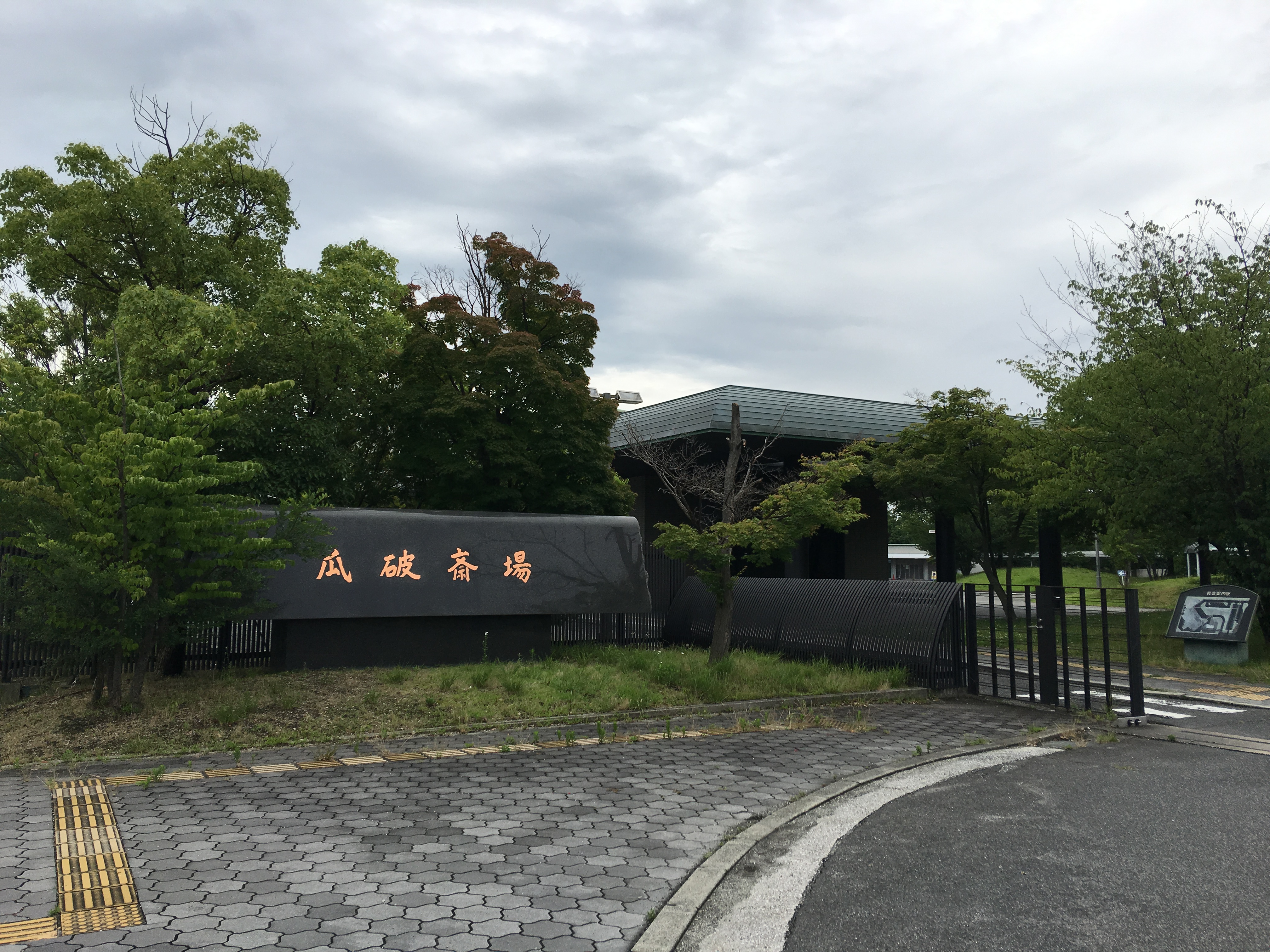 大阪市立の斎場